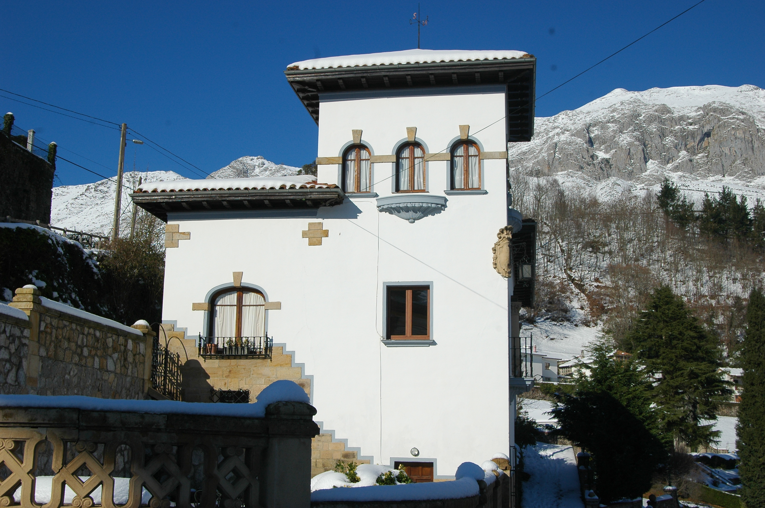 Villa El Jacal, casona indiana n'Alles.